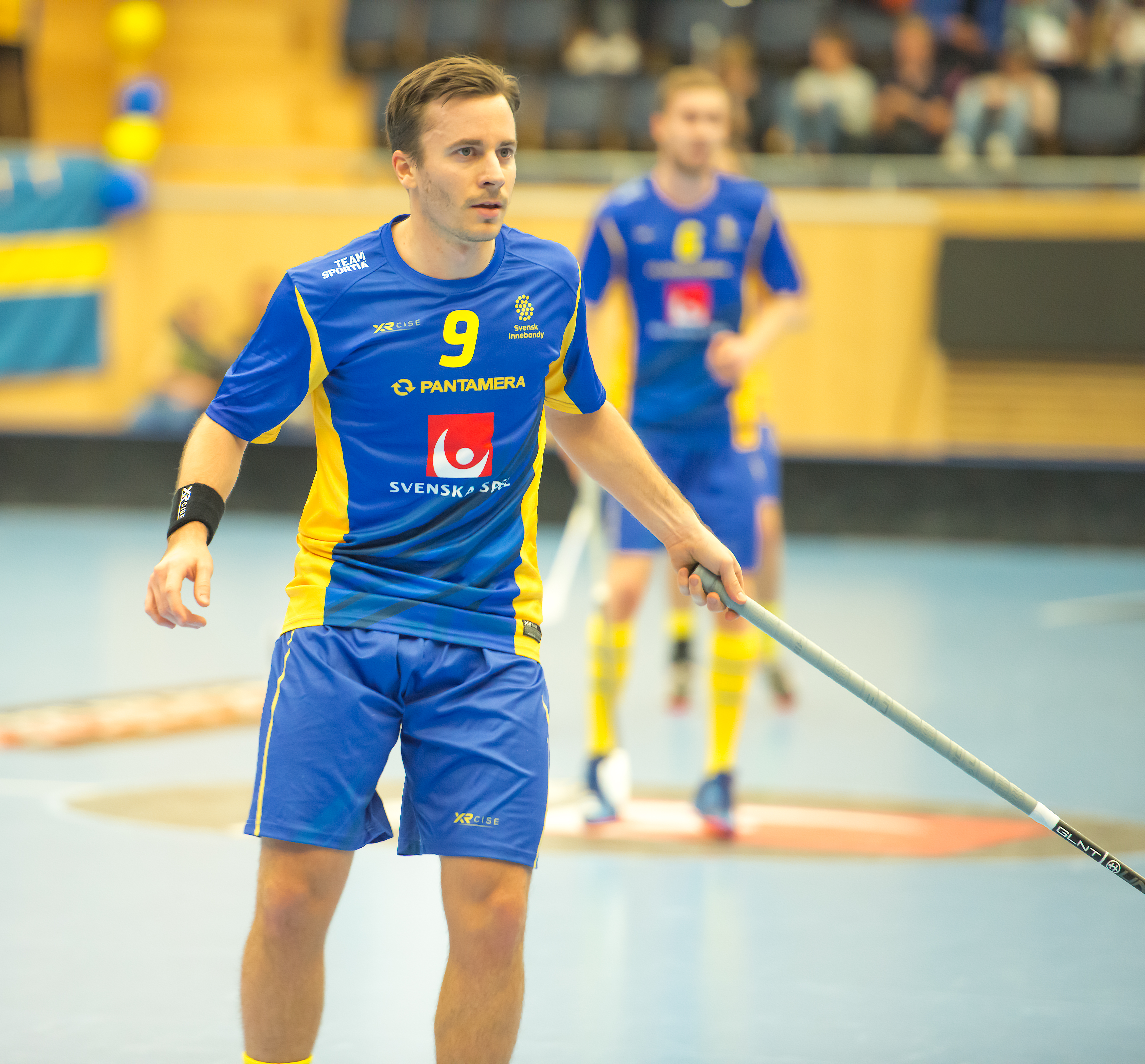 Match summary